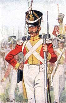 Sächsischer Soldat: 1813-1815 Sächsische Generalität und Infanterie; Grenadier der Sächsischen Leib-Grenadier Garde